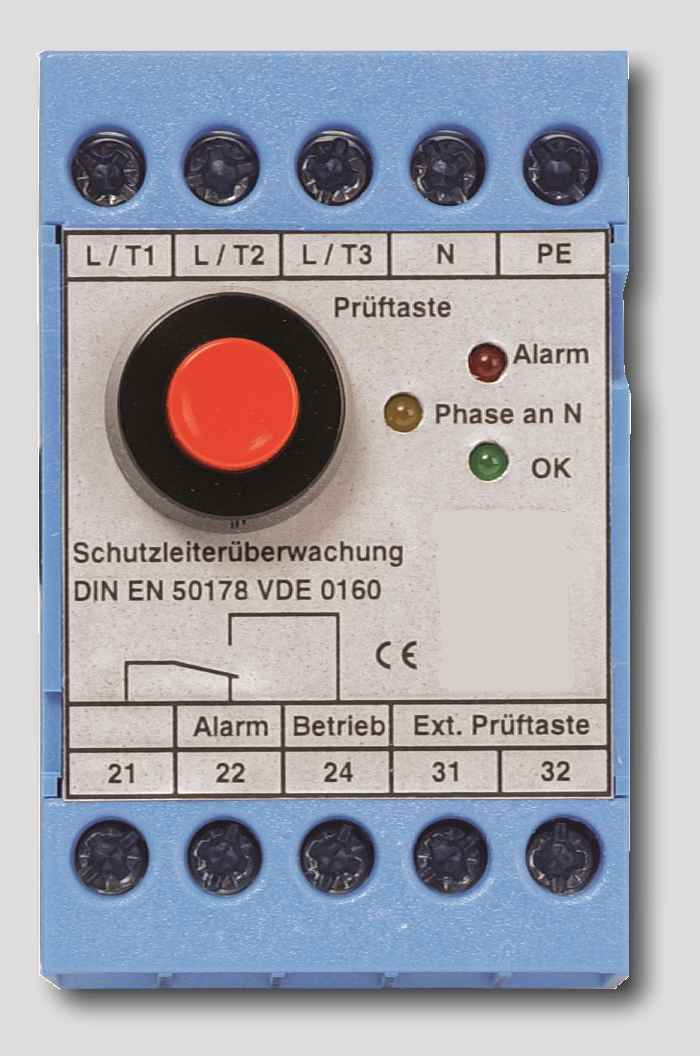 Bild einer Schutzleiterüberwachung